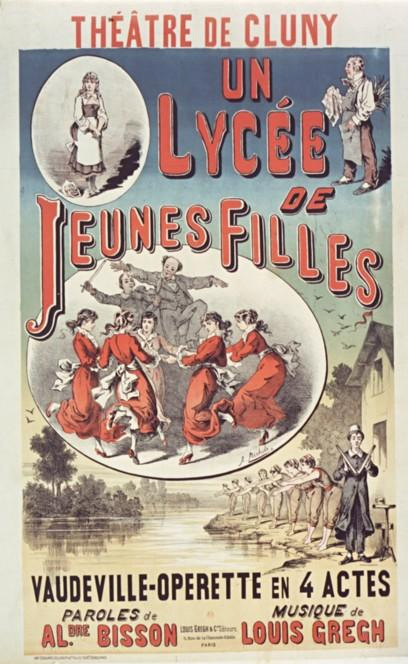 Théâtre de Cluny. Un lycée de jeunes filles : vaudeville-opérette en 4 actes... musique de Louis Grech.. (affiche)